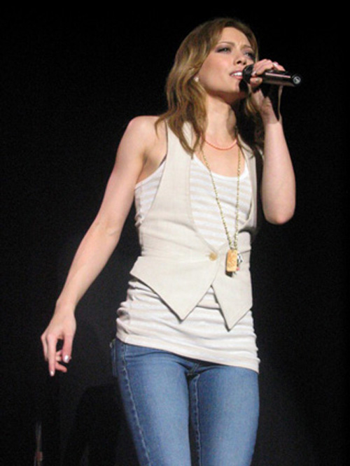 Copyright by Wytse Kloosterman als maker van de foto